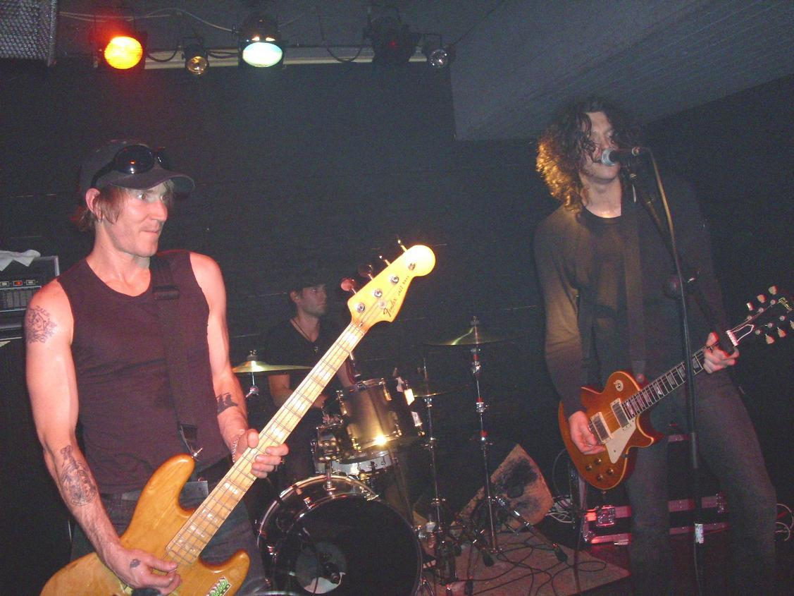 Wurlitzer Ballroom Madrid , 1-Feb-2008